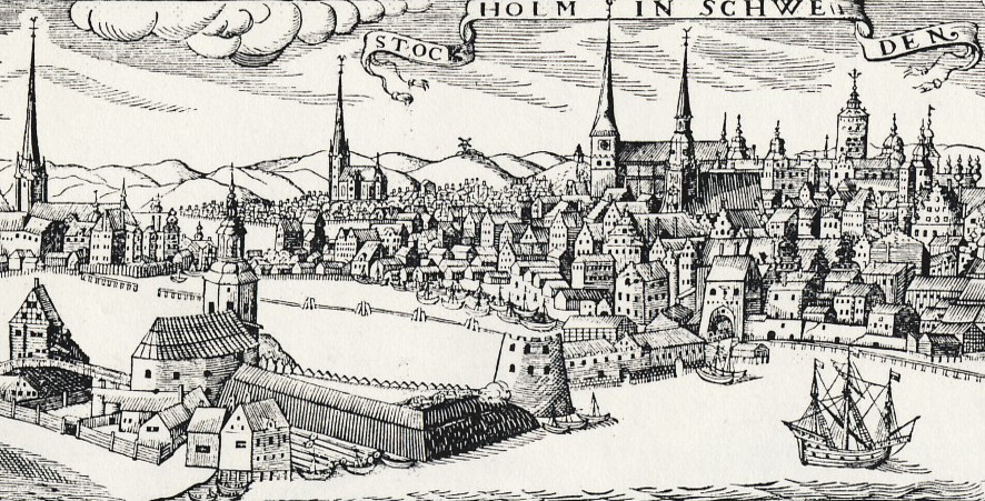 Stockholm från Mosebacke, träsnitt av Henrik Keyser 1637 (utsnitt visande Söderport)